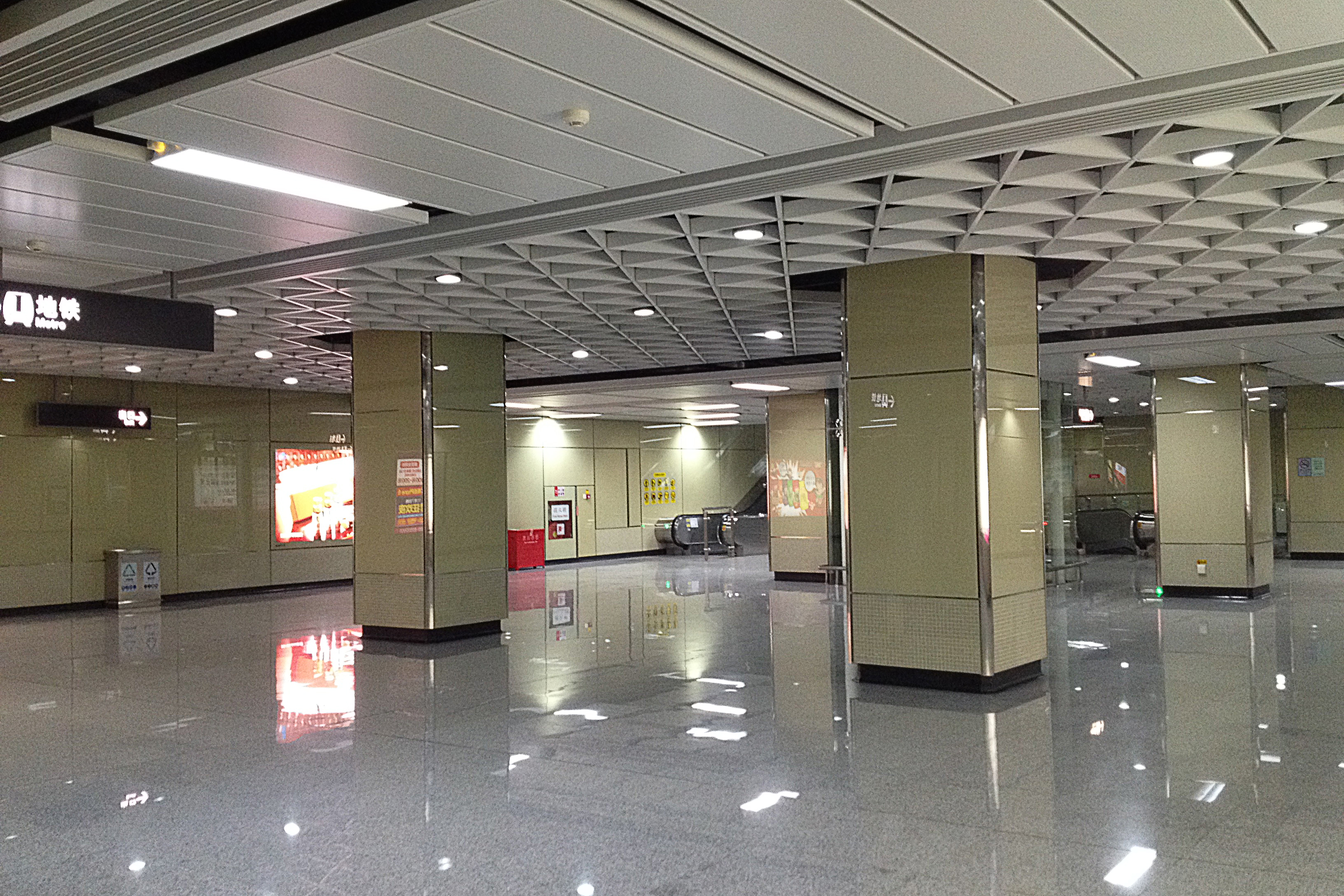 广州地铁鱼珠站地下二层缓冲平台